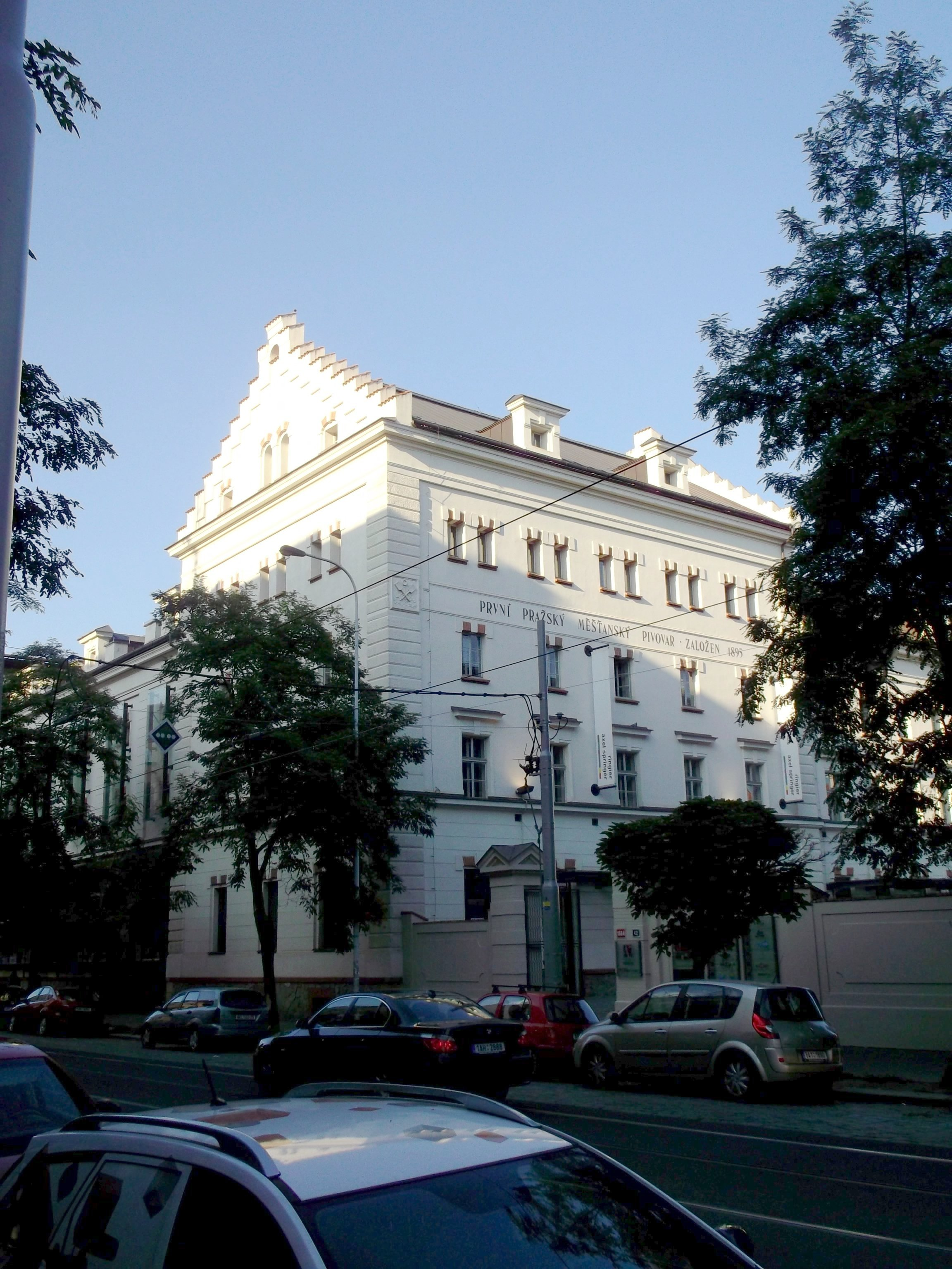 Měšťanský pivovar Holešovice, Praha 7-Holešovice, Komunardů 42